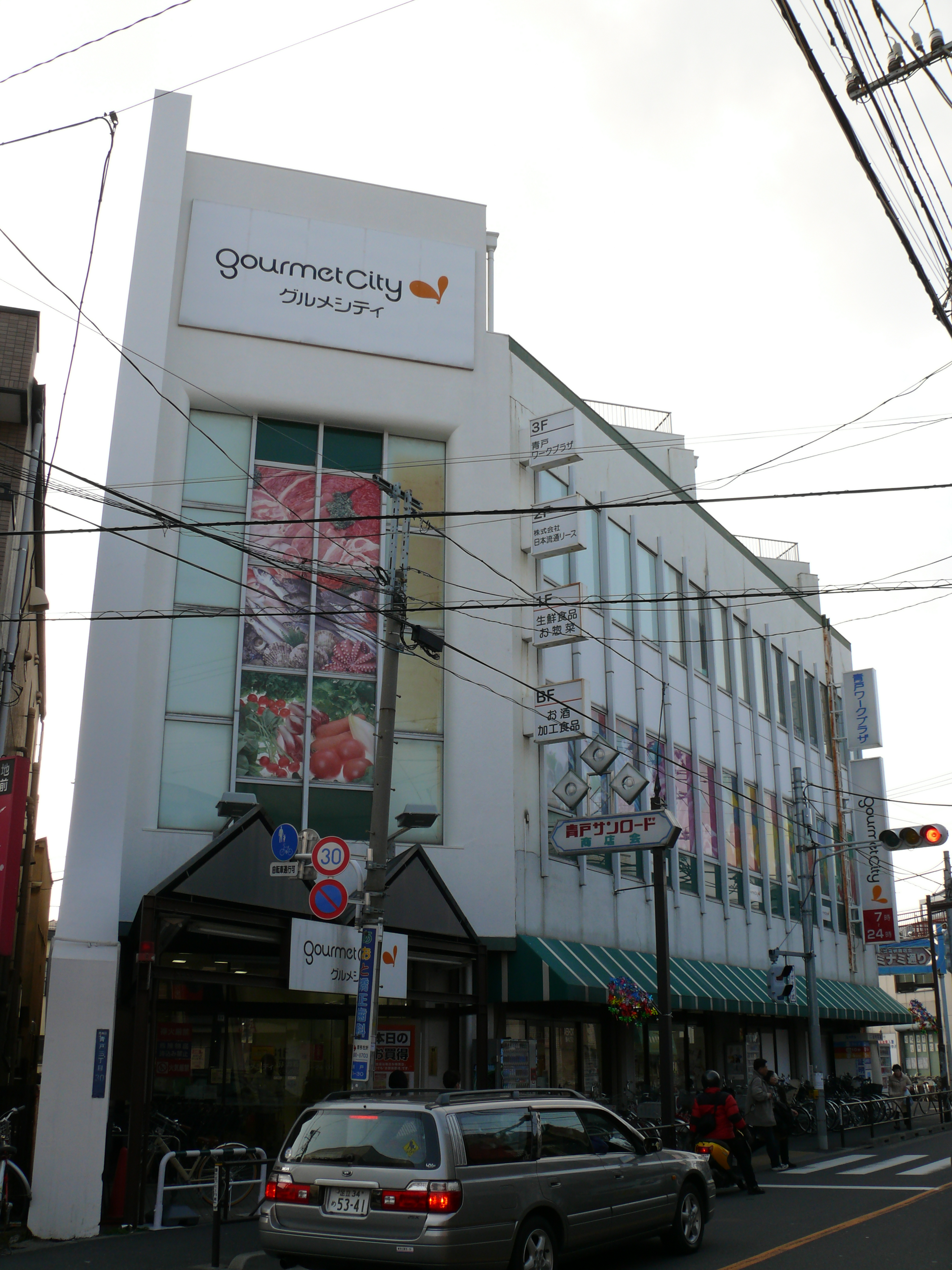 グルメシティ青戸店